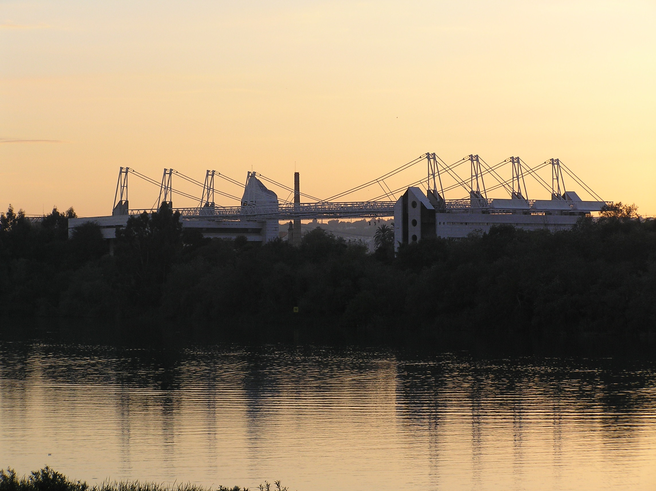 Auditorio de la Cartuja (Sevilla).